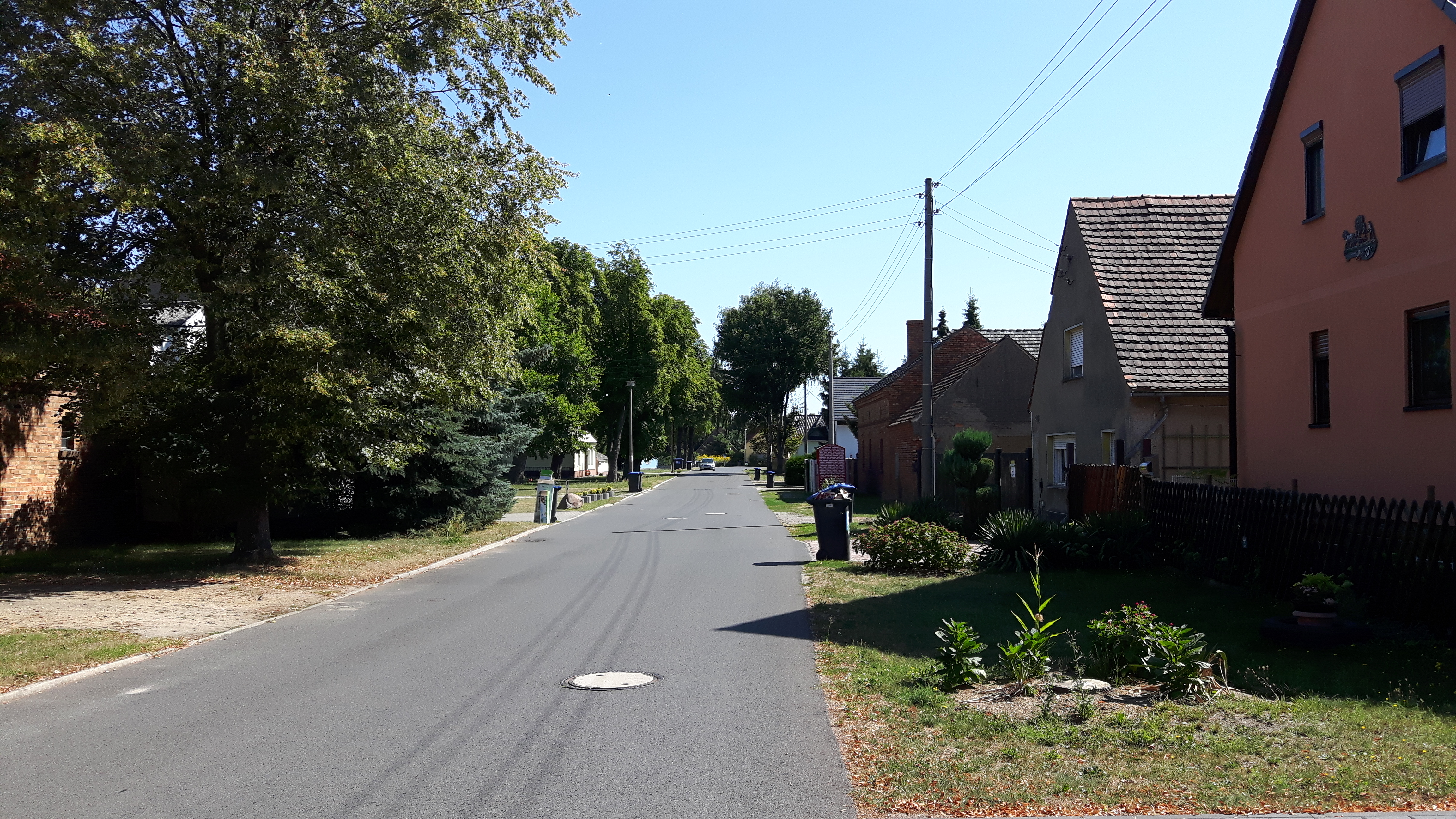 Dorfstraße von Stennewitz, einem Wohnplatz der Stadt Lübbenau/Spreewald im Landkreis Oberspreewald-Lausitz in Brandenburg.